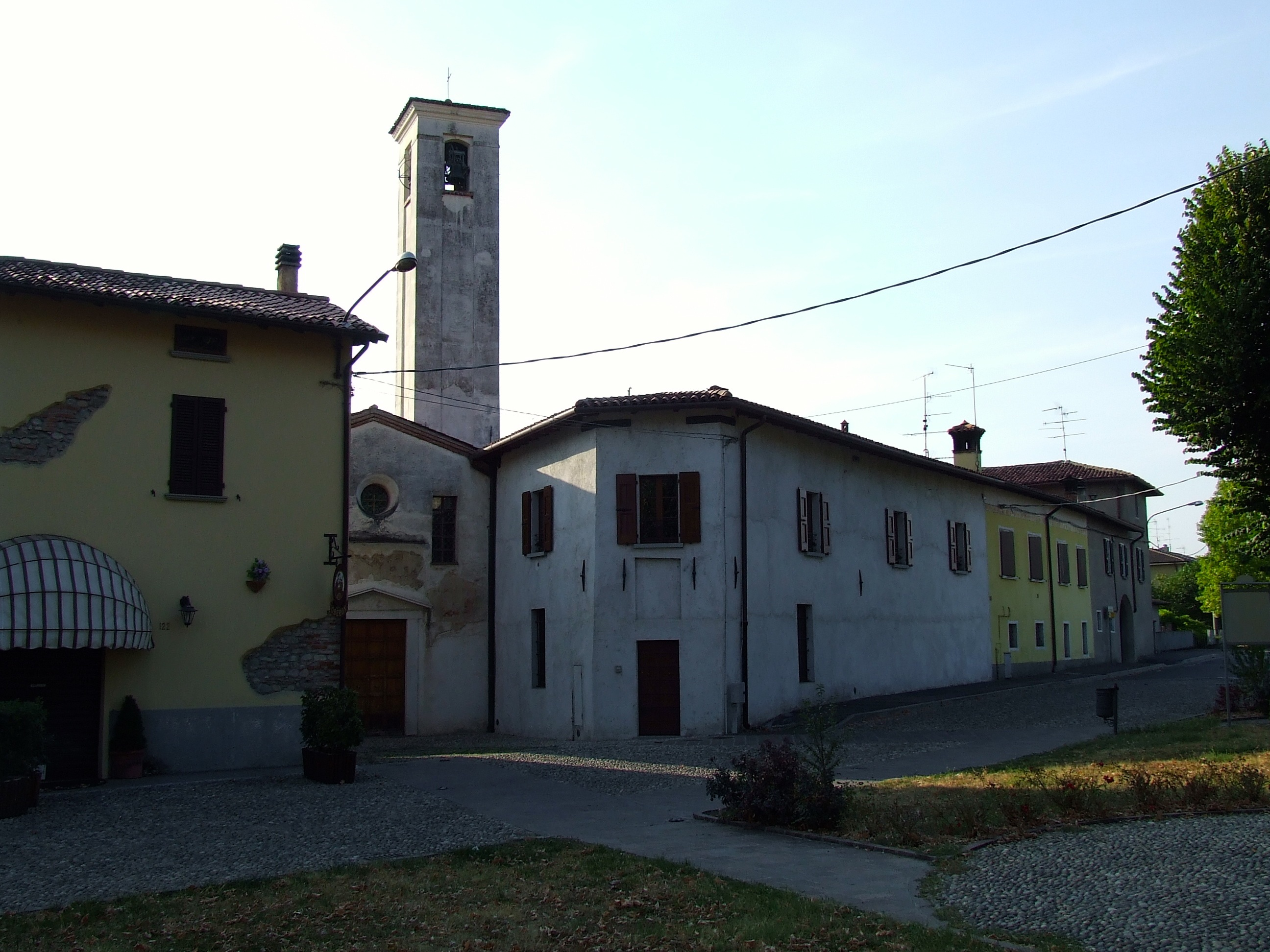 Borgo storico di Lovernato, Ospitaletto